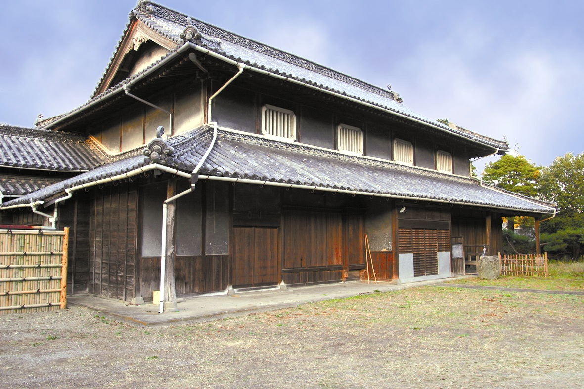 The barn of the Old Residence of the Aoki Family in Mima-shi, Tokushima-ken, Japan